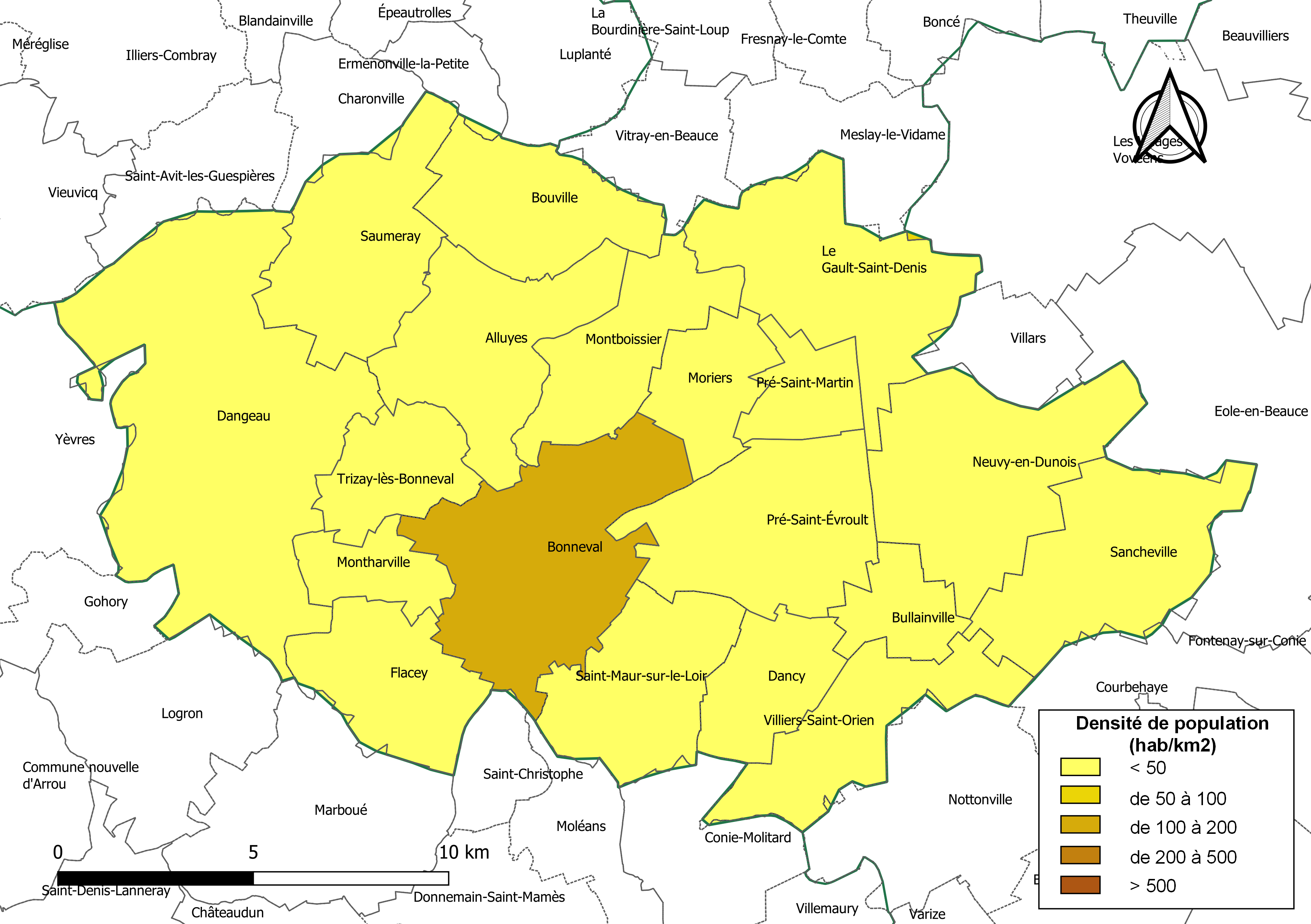 Carte des densités de population (millésimée 2016) des communes de la communauté de communes la Communauté de communes du Bonnevalais, département d'Eure-et-Loir, France. Composition au 1er janvier 2019.